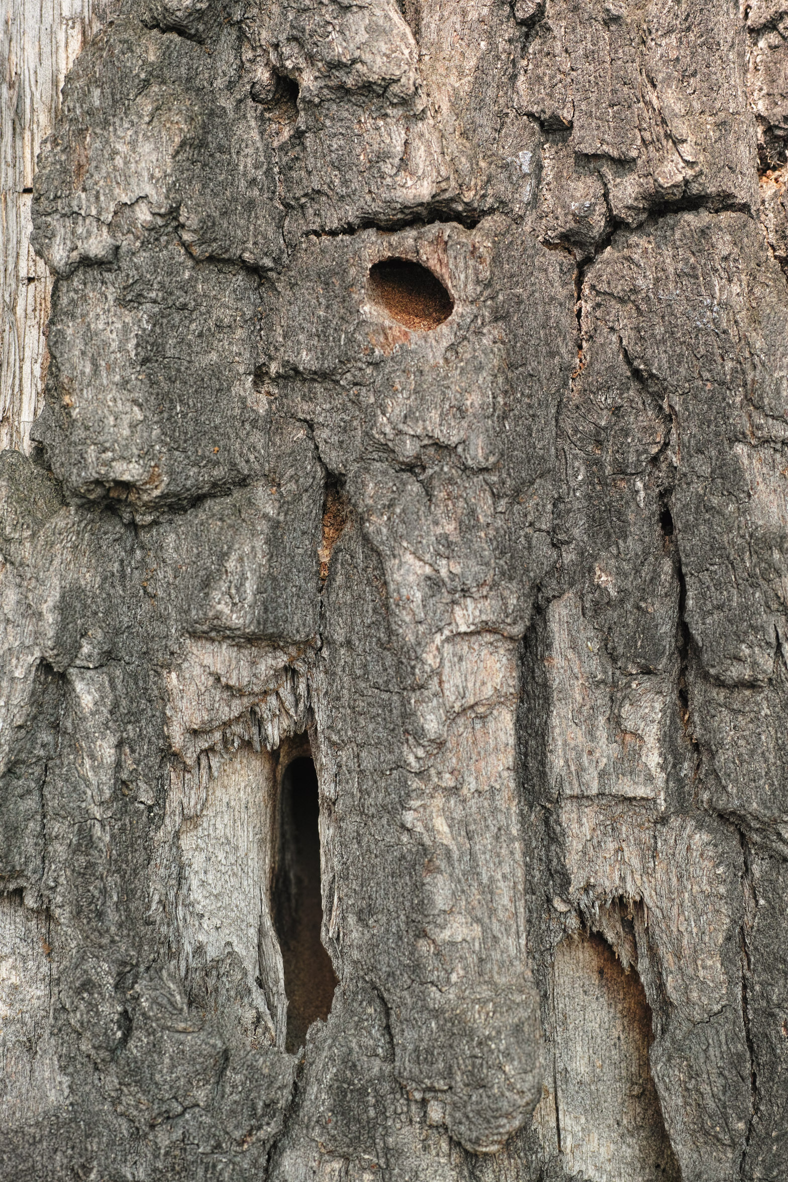 výletové otvory tesaříka obrovského na dubu letním